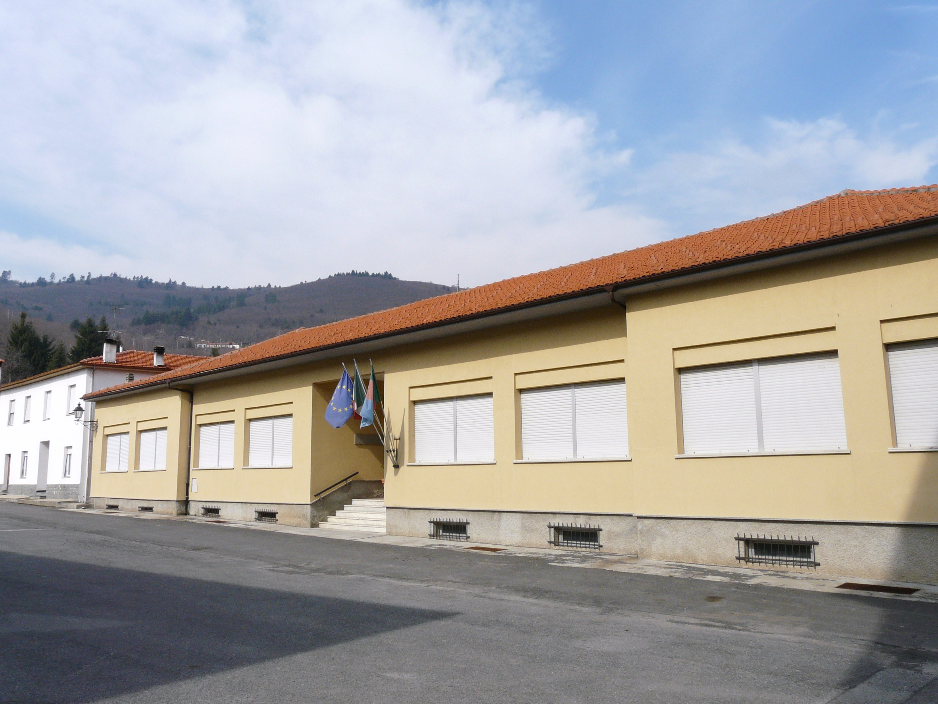 Municipio di Bormida, Liguria, Italia